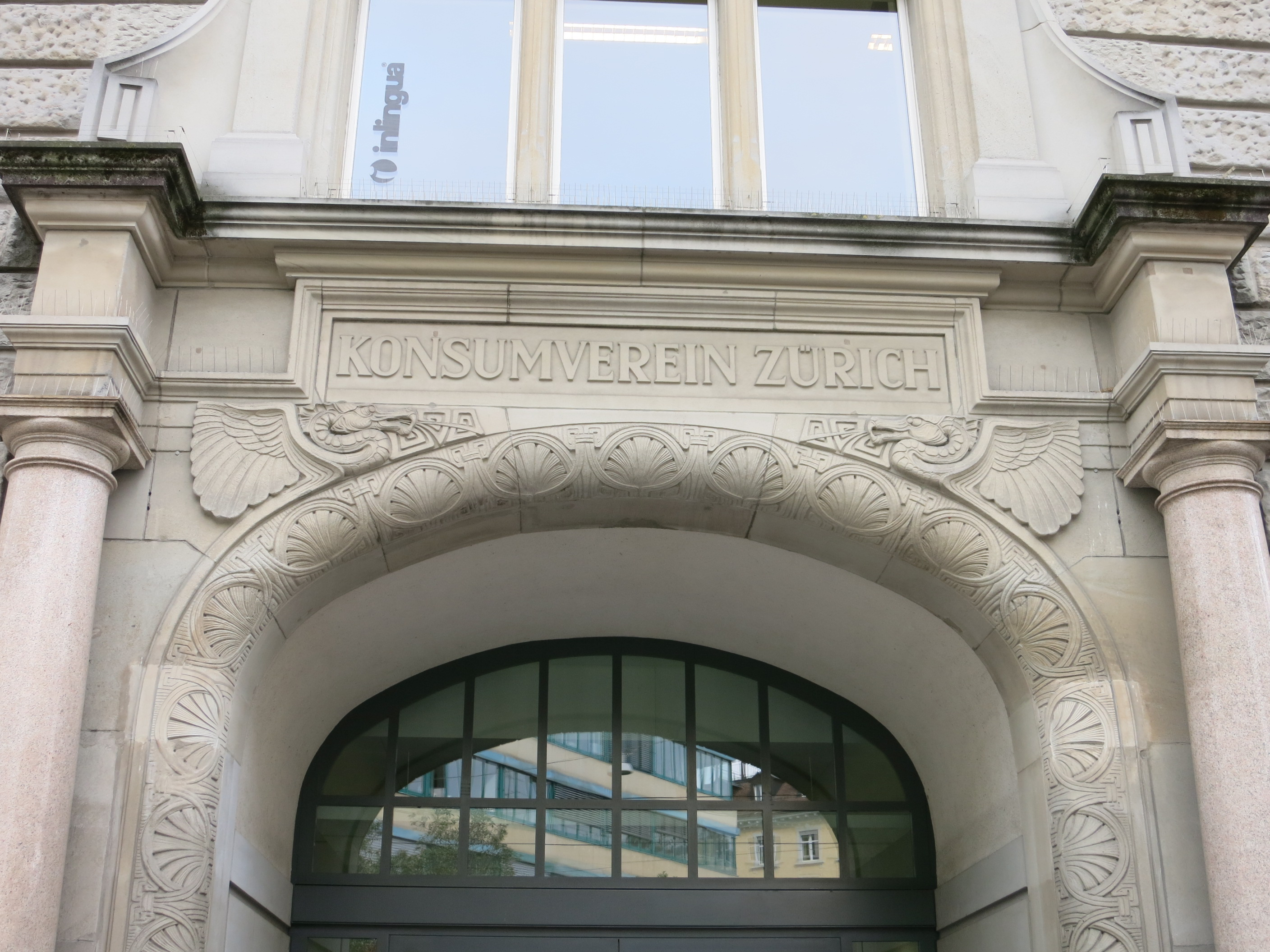 ehemaliges Verwaltungsgebäude des Konsumvereins Zürich von 1906, beim Stauffacher, Stadt Zürich ZH, Schweiz